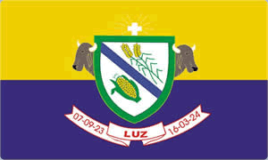 Bandeira - Município de Luz - MG